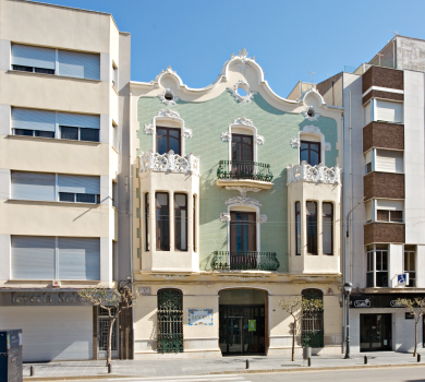 Casa Bosch, edifici del modernisme valencià en Benicarló (Castelló).